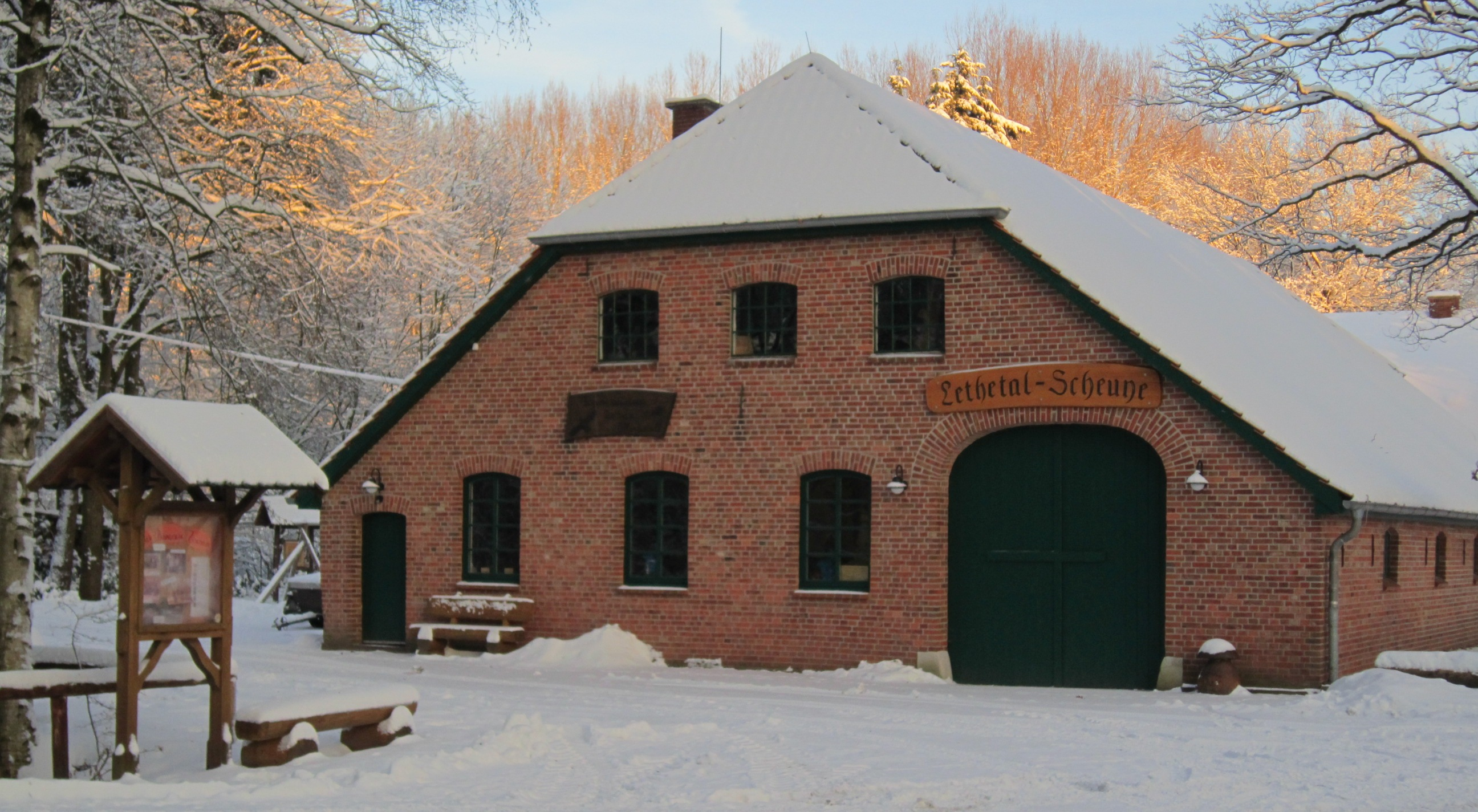 Lethetal-Scheune auf dem Gelände der Staatlichen Teichwirtschaft Ahlhorn